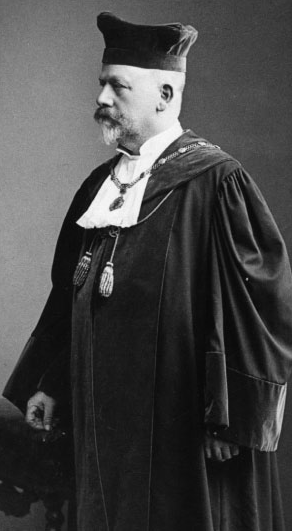 Gustav von Schleich in seiner Zeit als Rektor der Universität Tübingen 1909/10 (Universitätsarchiv Tübingen)